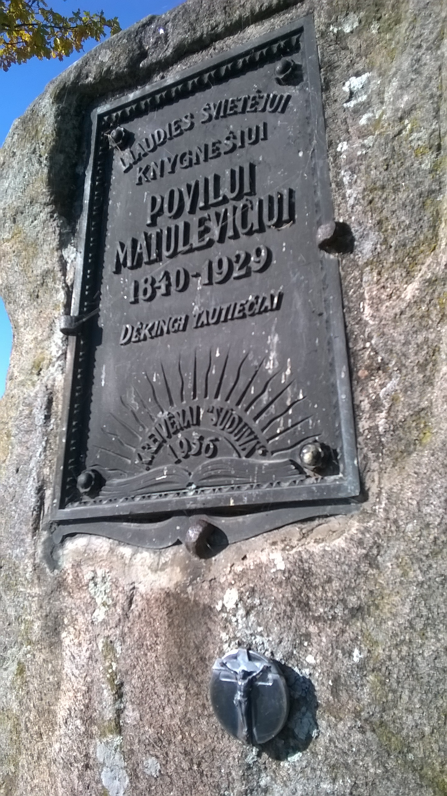 Obelisk wzniesiony przez tutejszą ludność ku czci "przemytnika" książek Pawła Matulewicza.